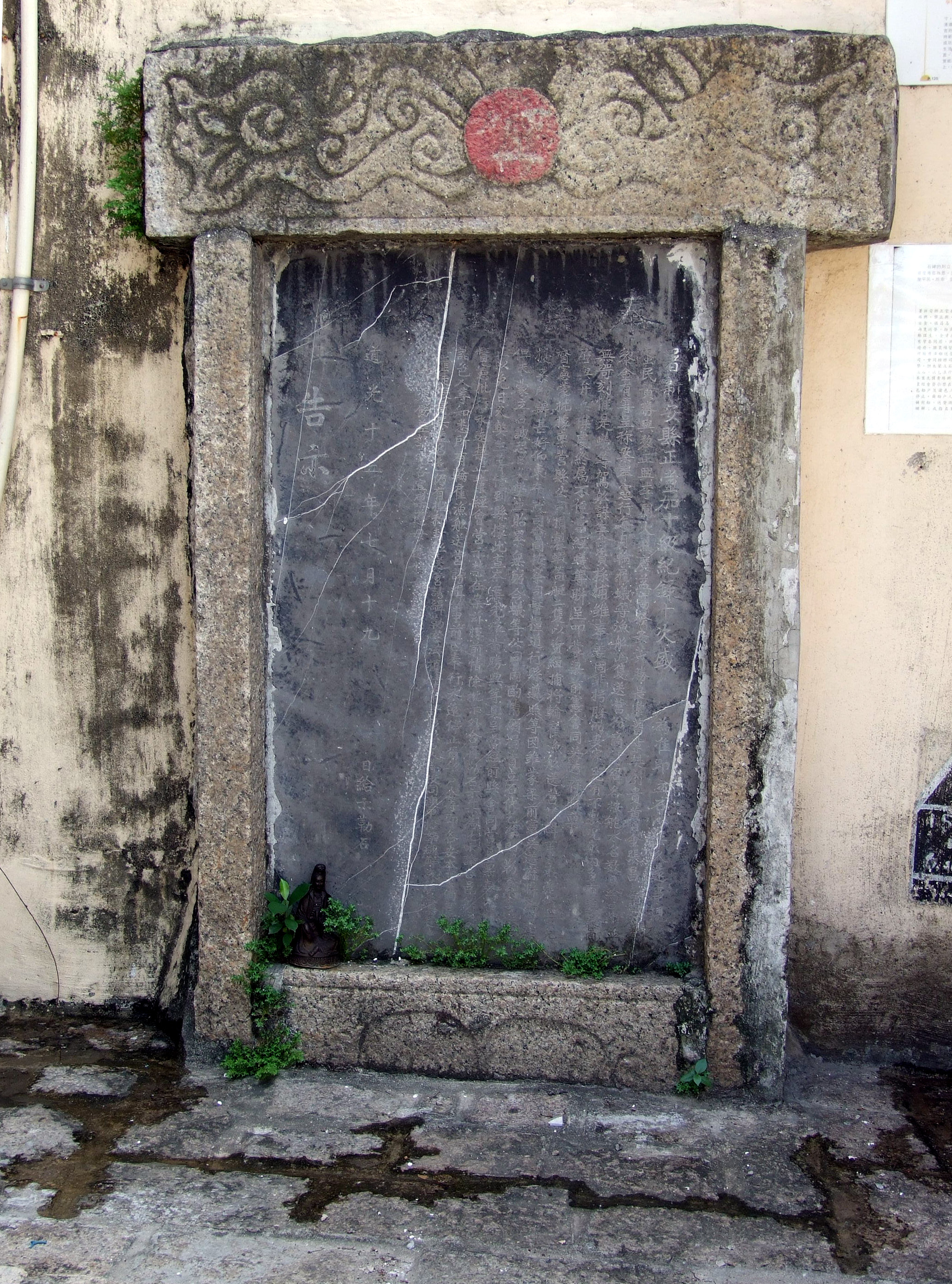 中文（香港）: 坪洲《奉禁封船碑》